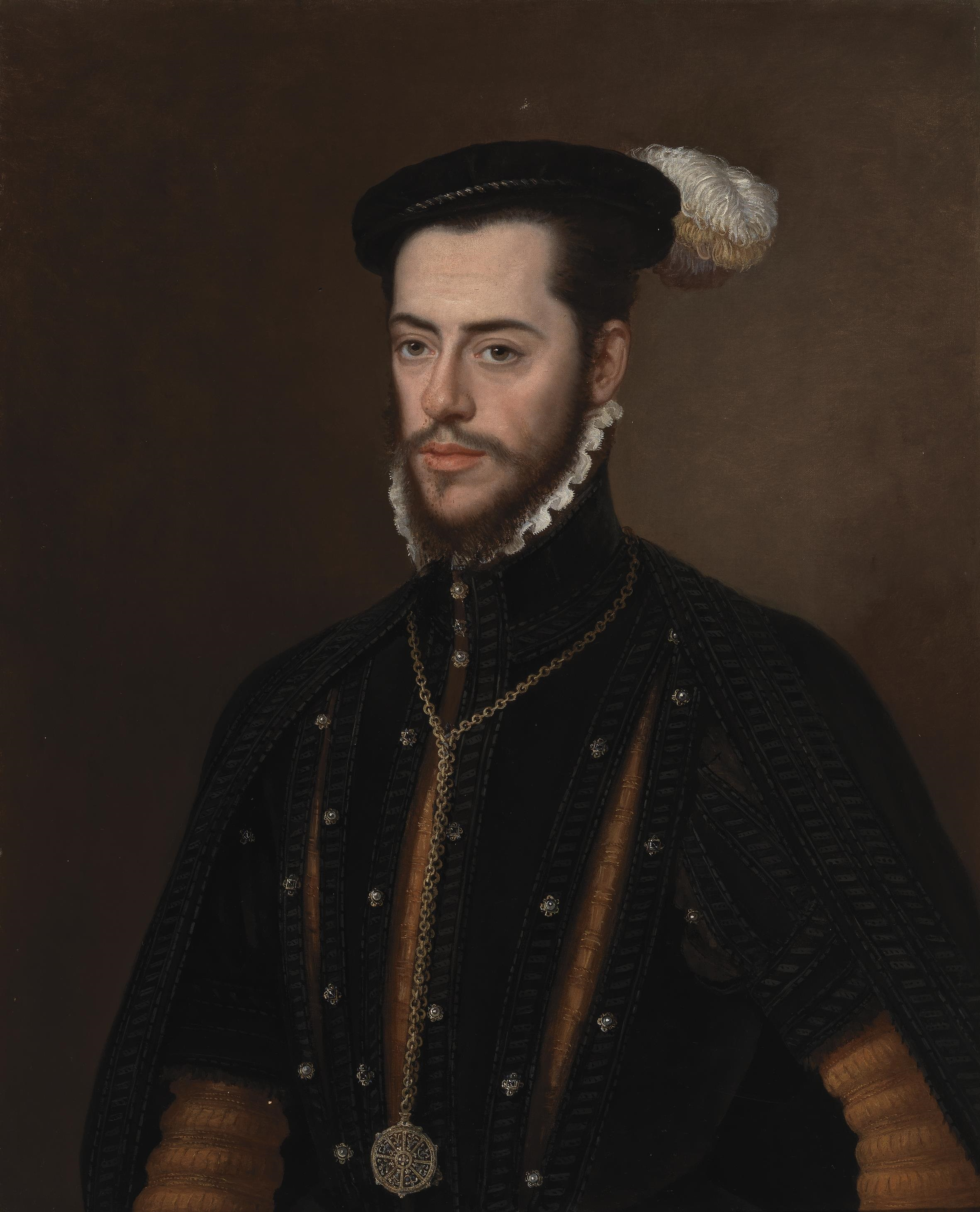 Retrato del aristócrata español Martín Gurrea de Aragón (1526-1581), que fue duque de Villahermosa, conde de Ribagorza y tataranieto del rey Juan II de Aragón.